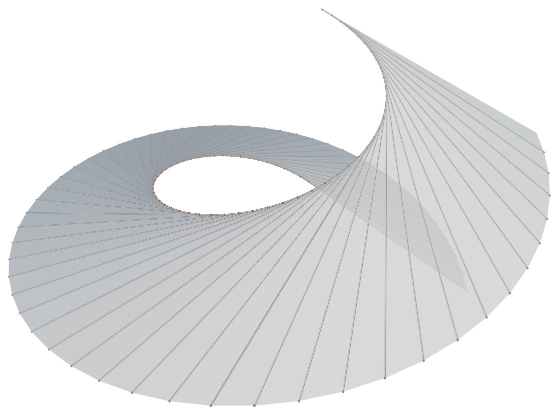 Een voorbeeld van een ontwikkelbaar oppervlak gevormd door raaklijnen aan een kromme in 3D, hier één winding van een helix